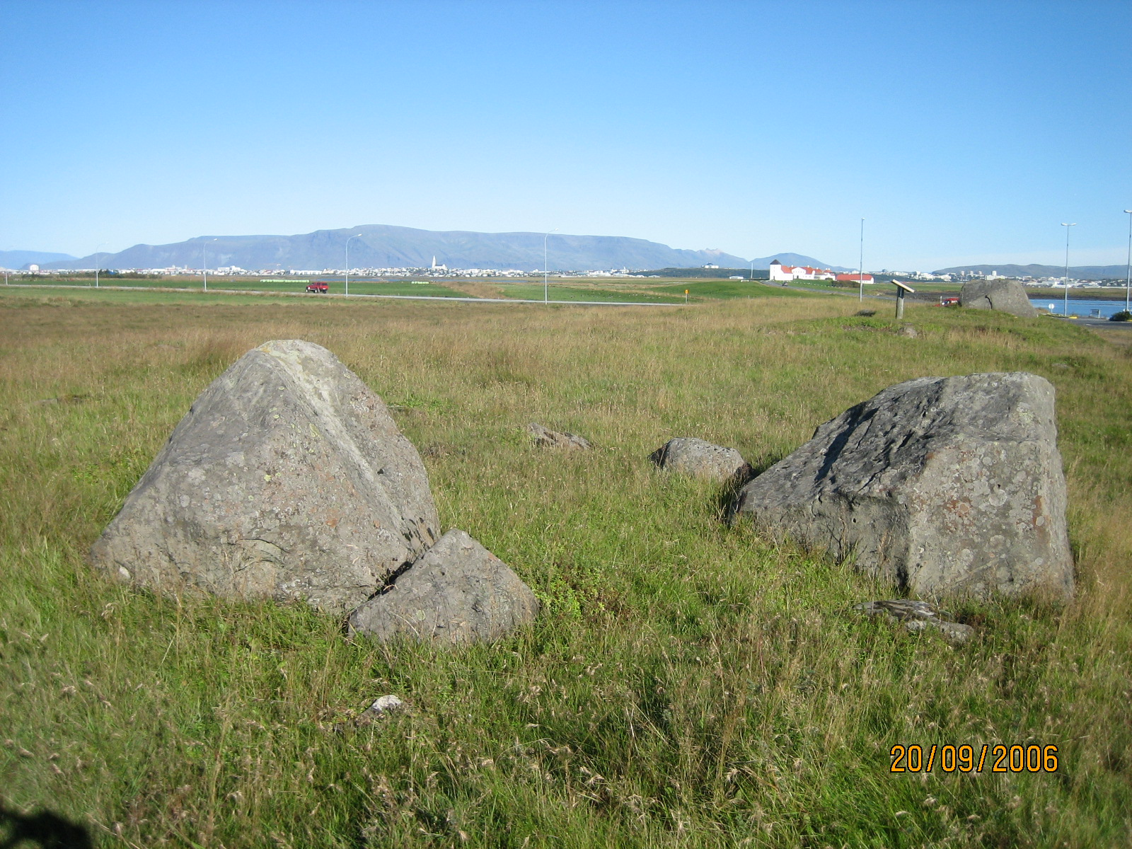 Álfasteinar Álftanesi Photo by Guðlaug Helga Konráðsdóttir Oct 2006